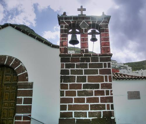 Iglesia de San Andrés (Tenerife)